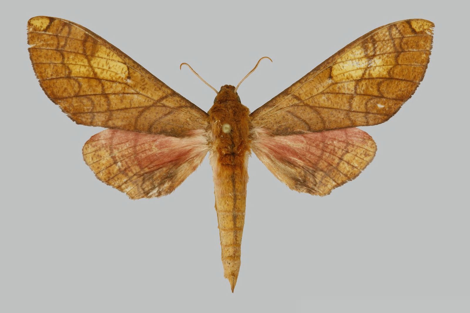 Afrosphinx amabilis, male, upperside. Zaire, Shaba, Luéna